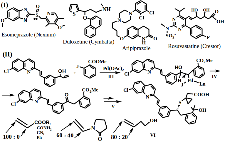 Բարդ մոլեկուլների կլաստերային անալիզ